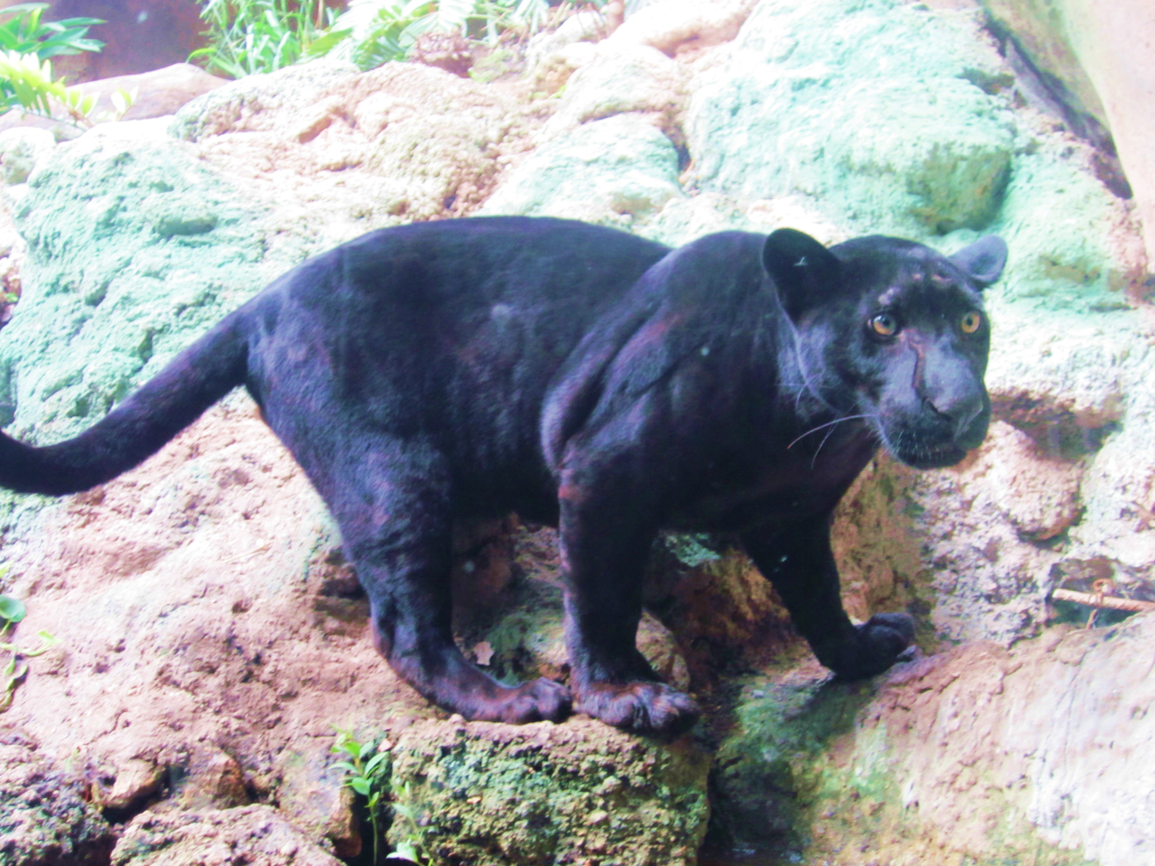 Pantera Negra, Biouniverzoo.